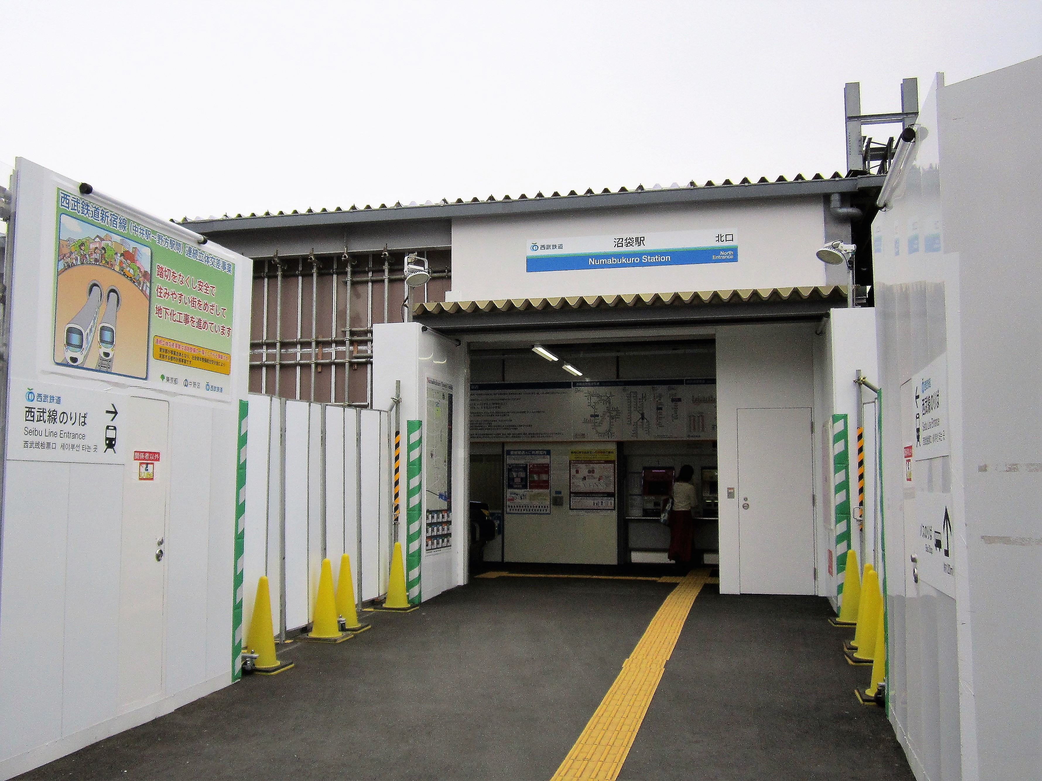 沼袋駅北口 仮駅舎（2019年7月）